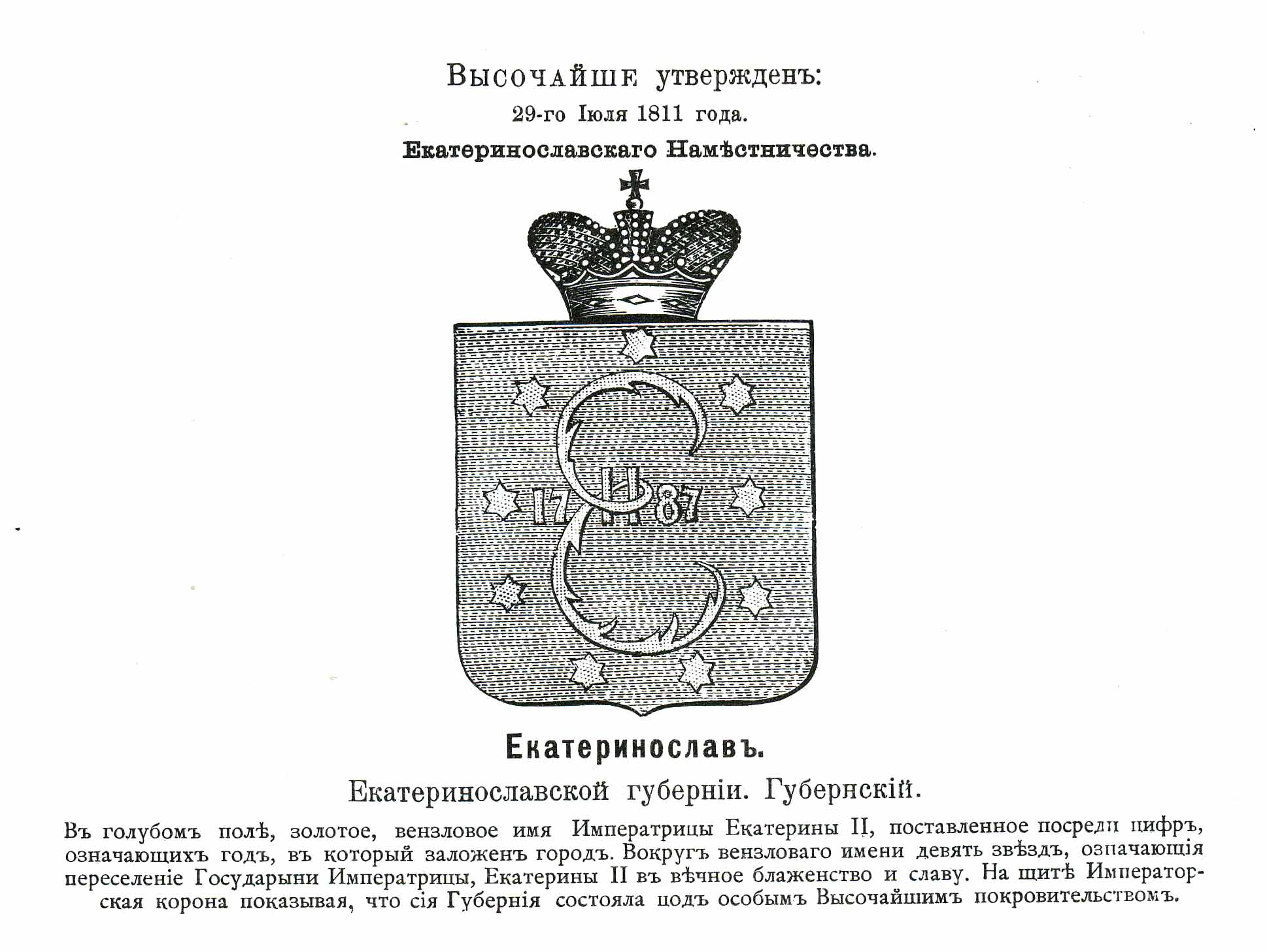 Official Russian Empire coat of arms Ekaterinoslav. Герб Российской Империи губернского города Екатеринослав с официальным описанием в Гербовнике Винклера.